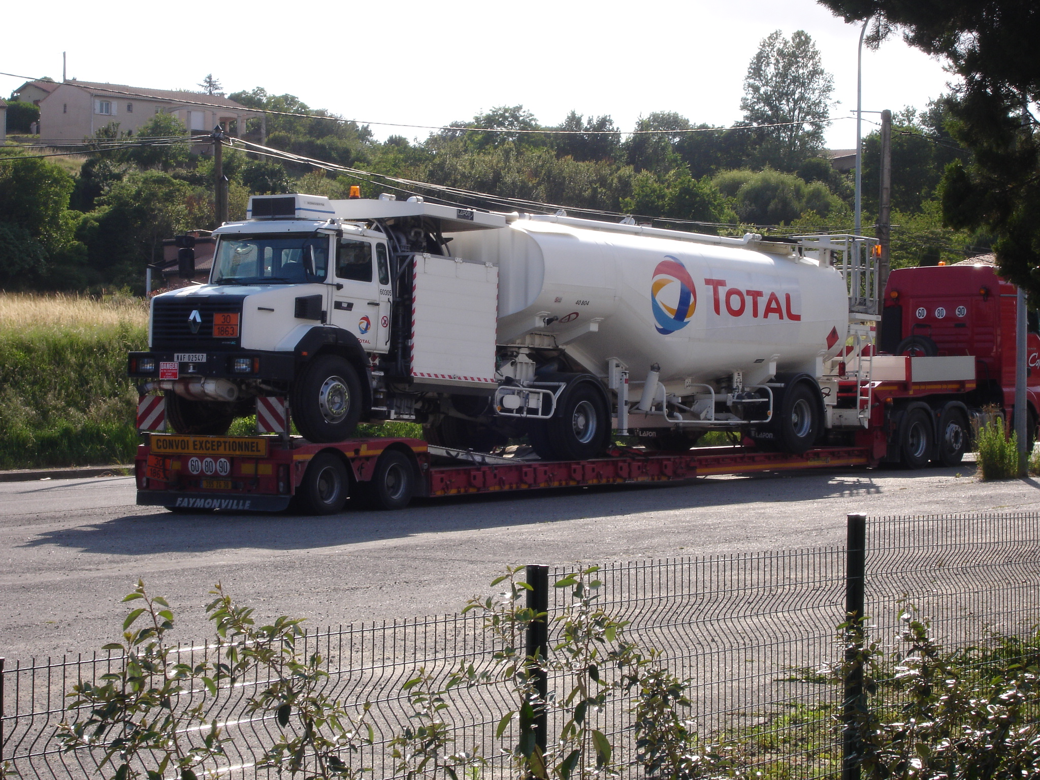 France, Haute-Garonne(31), Castanet-Tolosan, camion Total en panne ?